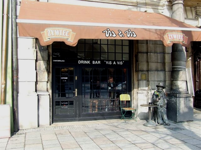 Kawiarnia Vis a Vis w Krakowie.